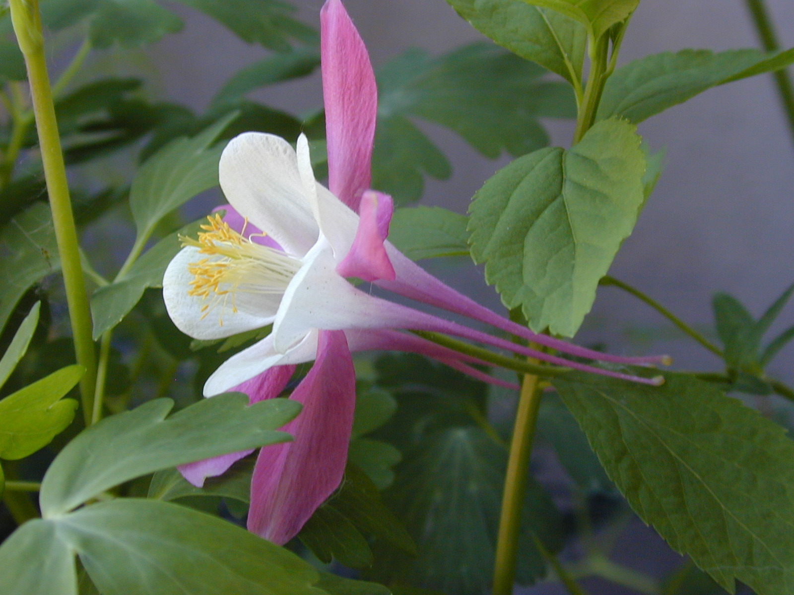 Aquilegia